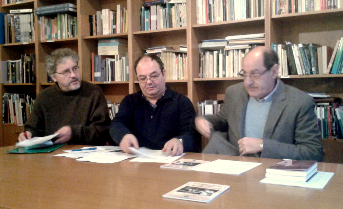 Manuel Rivas, Rubén Afonso e Manuel Monge, membros da Comisión pola Recuperación da Memoria Histórica (CRMH) da Coruña, na presentación dunha nova proposta ó concello para a supresión se símbolos franquistas na cidade.